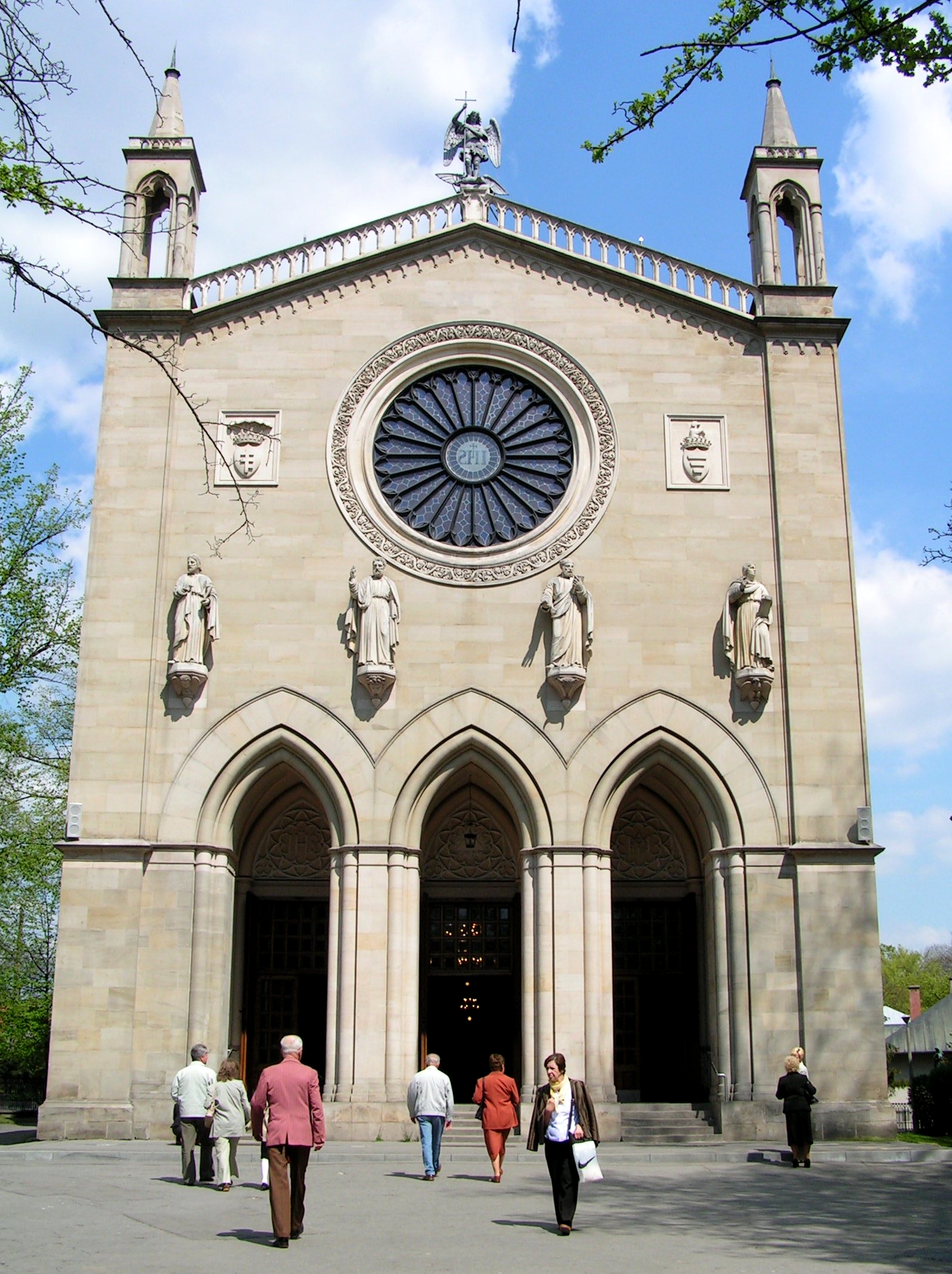 Kościół św. Marcina w Krzeszowicach wg projektu Karla Friedricha Schinkla